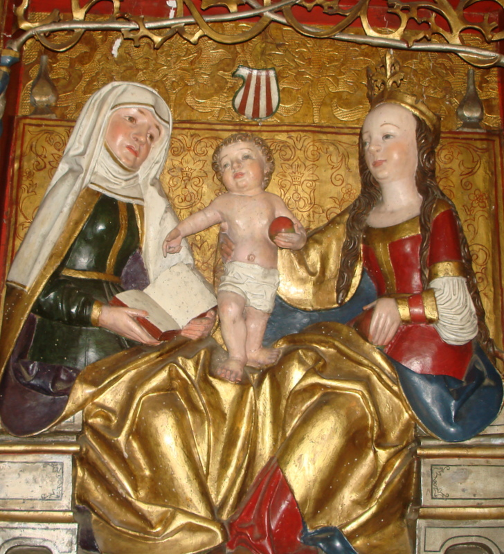 Kamienna Góra, kościół par. p.w. śś. Piotra i Pawła, XVI